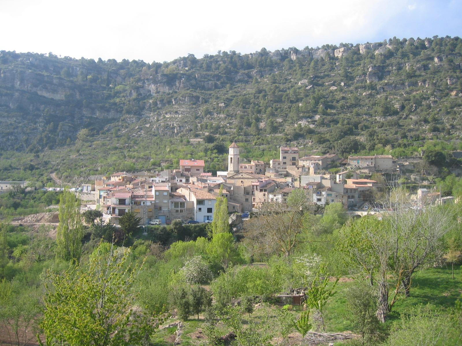 Vista General d'Arbolí